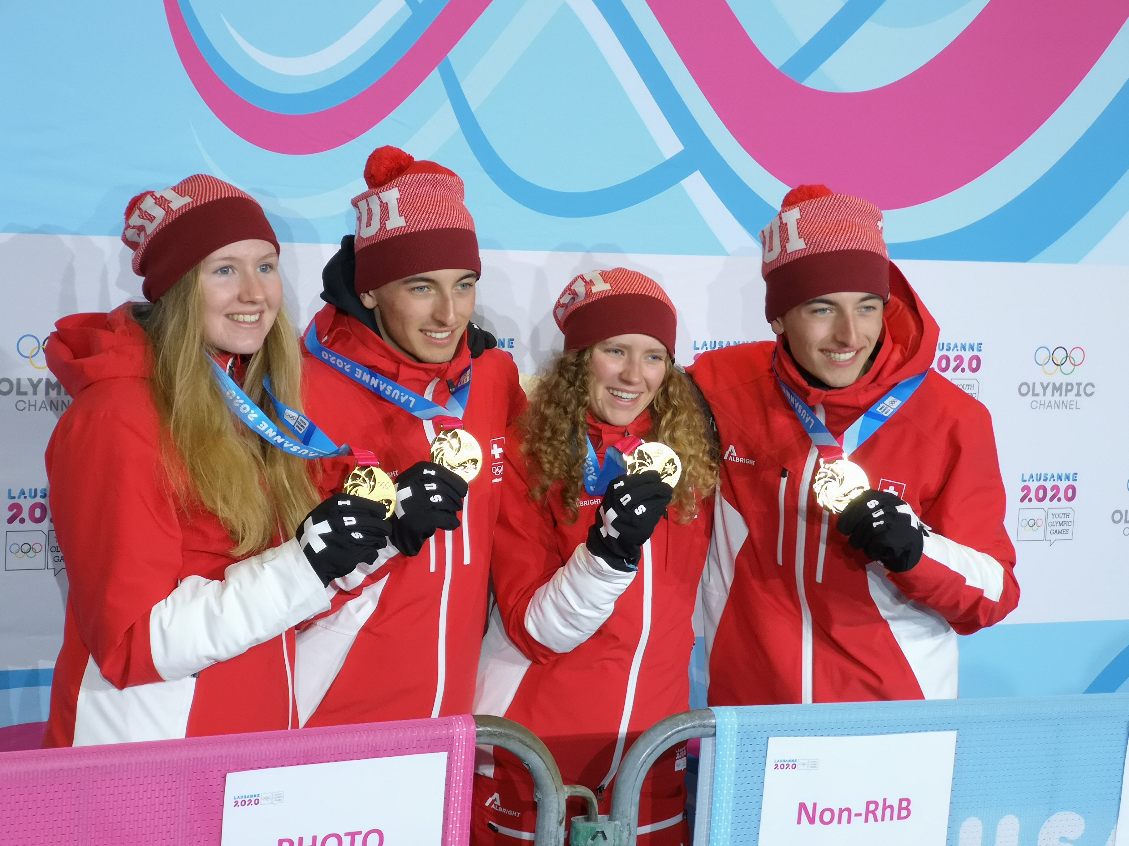 Équipe suisse de ski-alpinisme après la remise des médailles du relais des JOJ de Lausanne 2020.